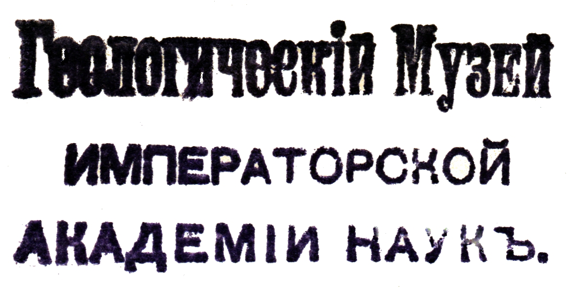 Геологический музей Императорской академии наук